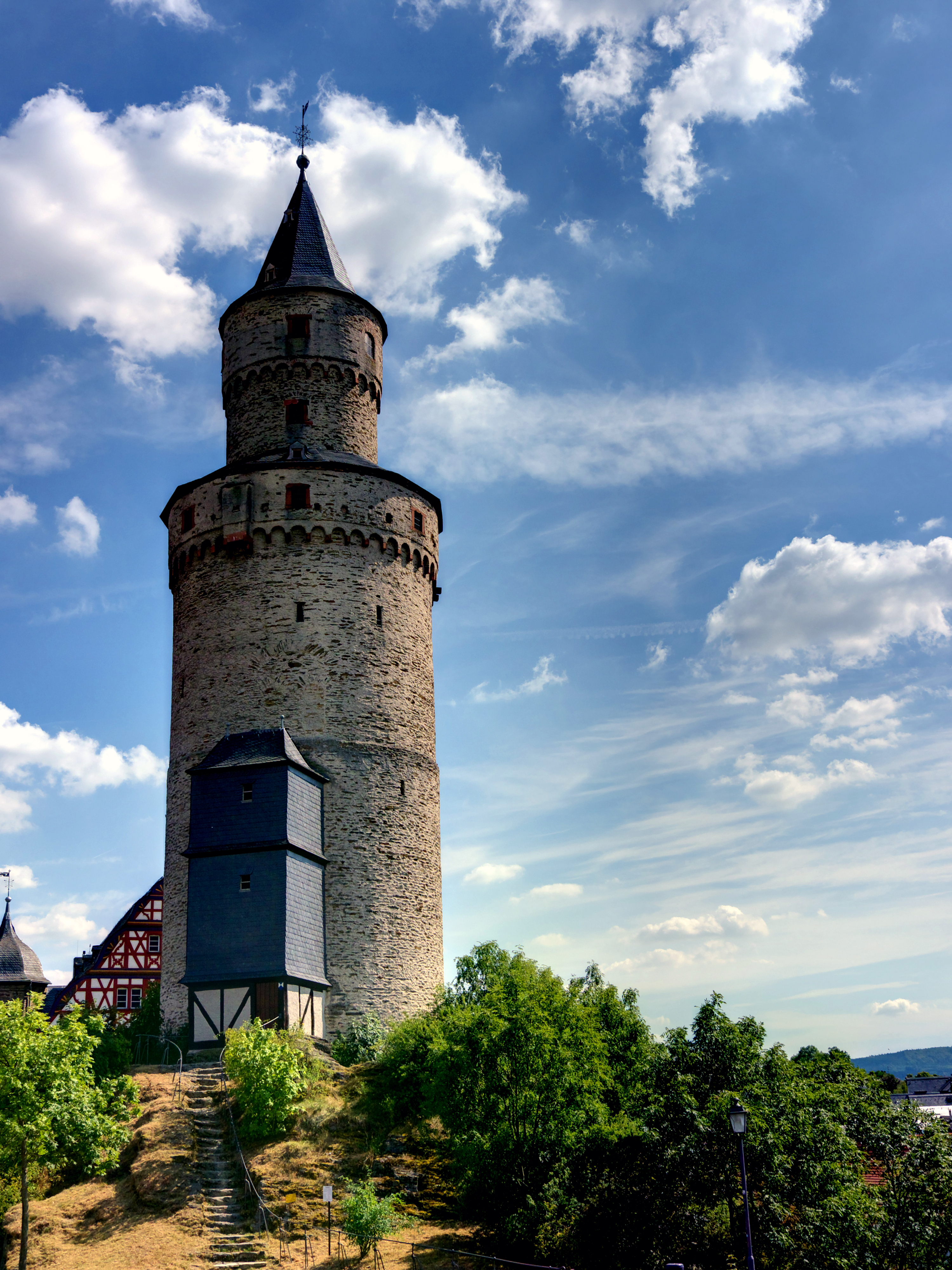 Hexenturm in Idstein/Hessen